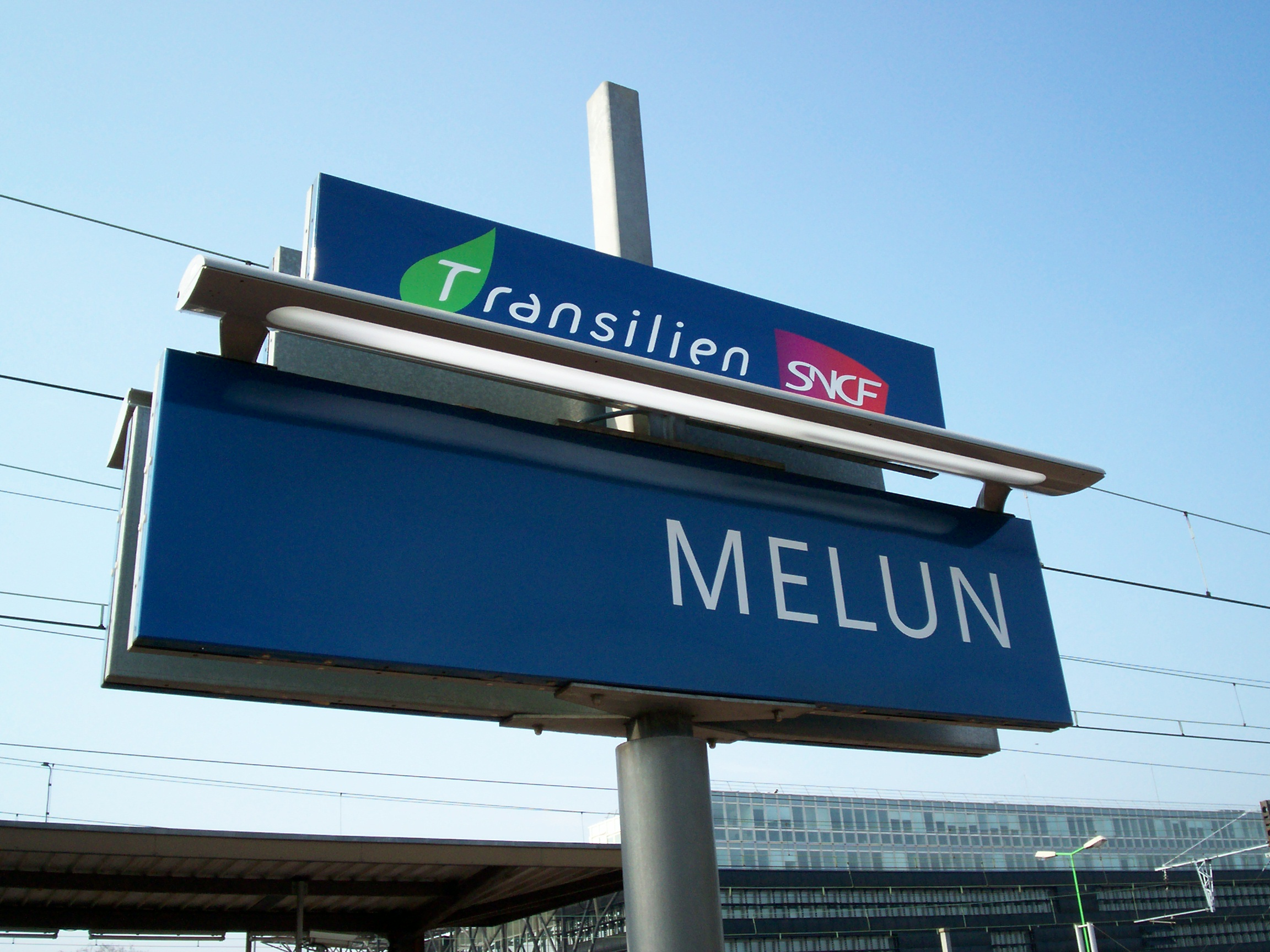 Gare de Melun